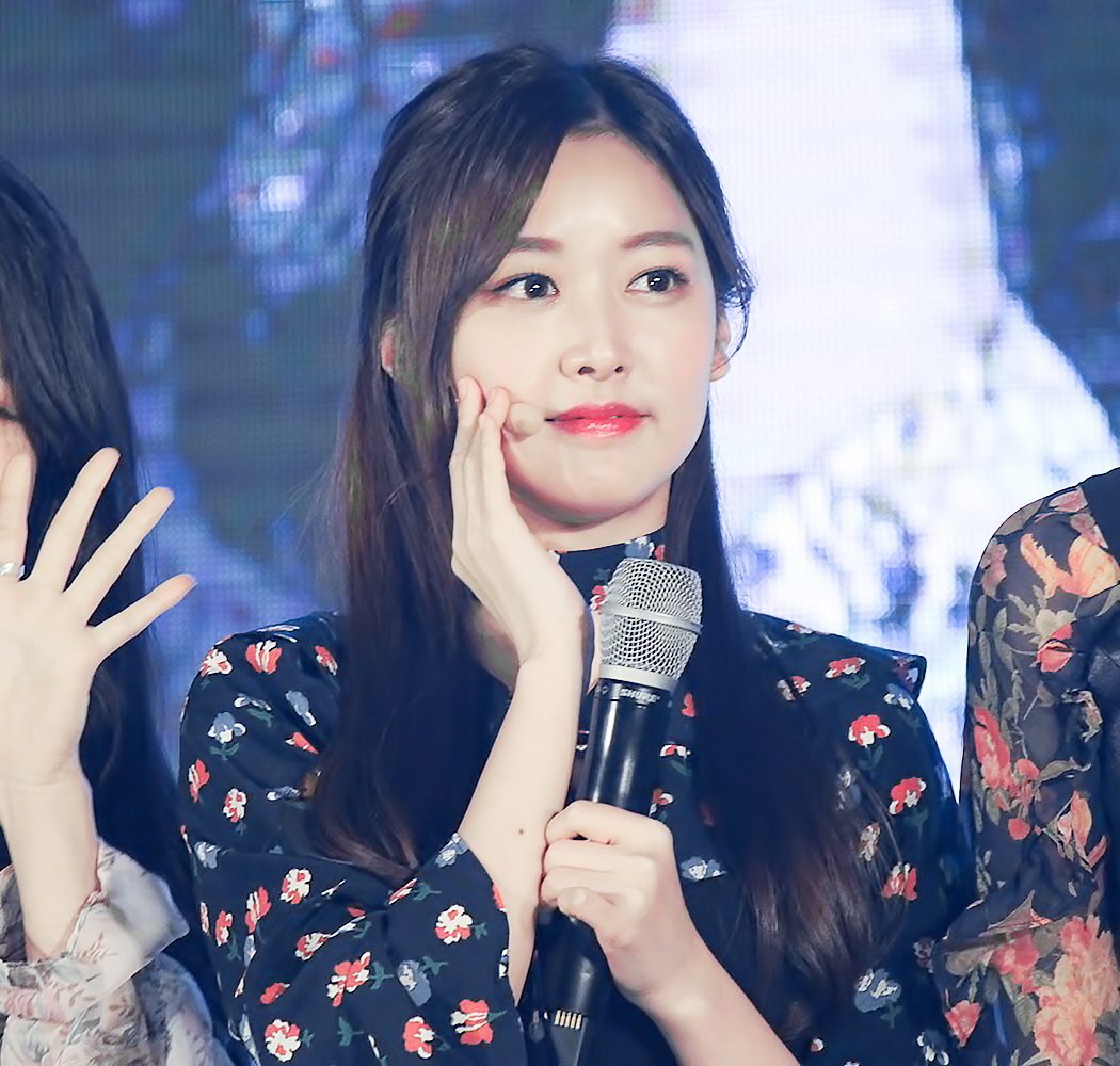 170526 안산 근로자 뮤직페스티벌 구구단 직찍